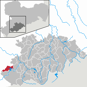 Stützengrün im Erzgebirgskreis, Sachsen